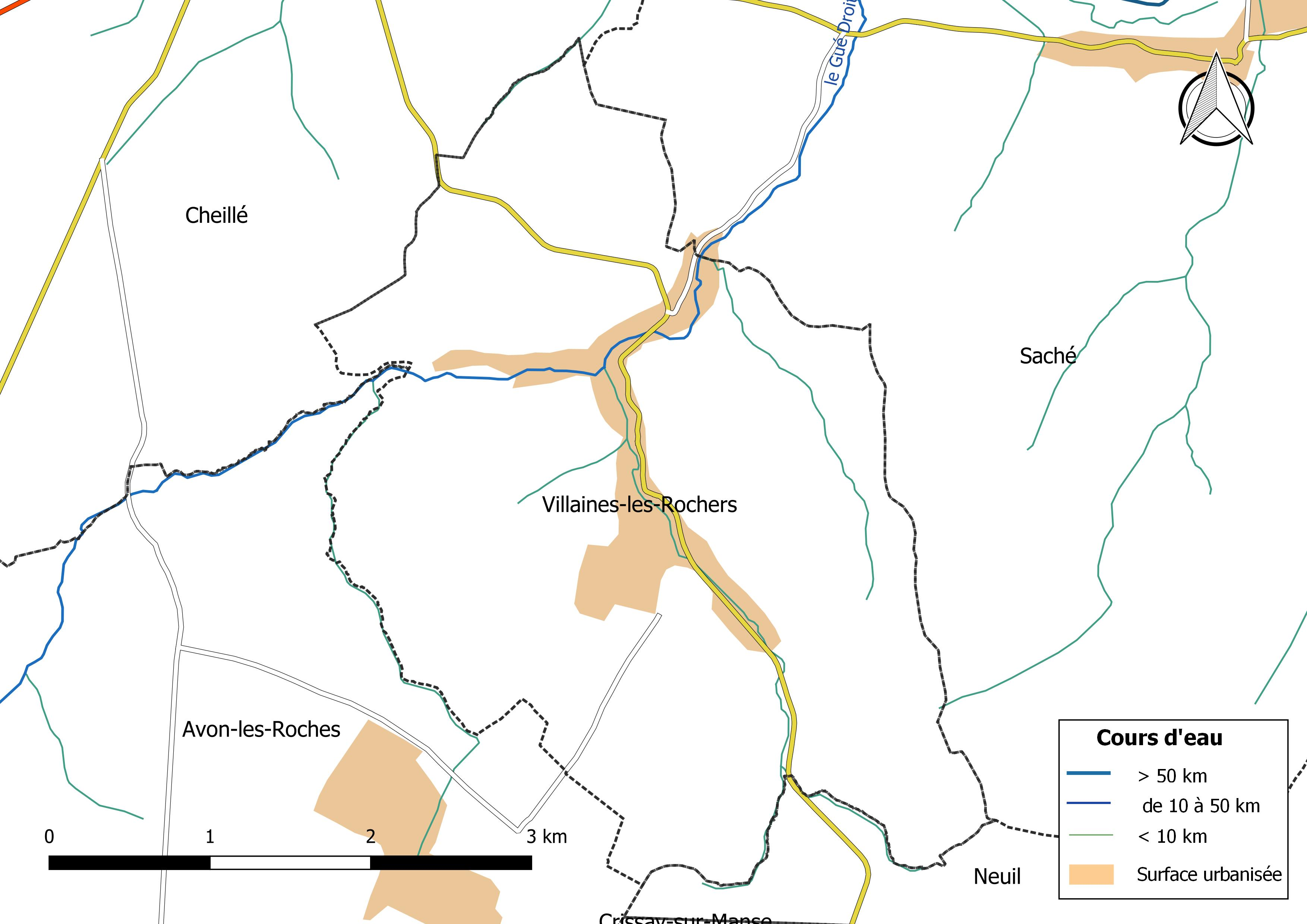 Carte du réseau hydrographique de la commune de Villaines-les-Rochers (France).